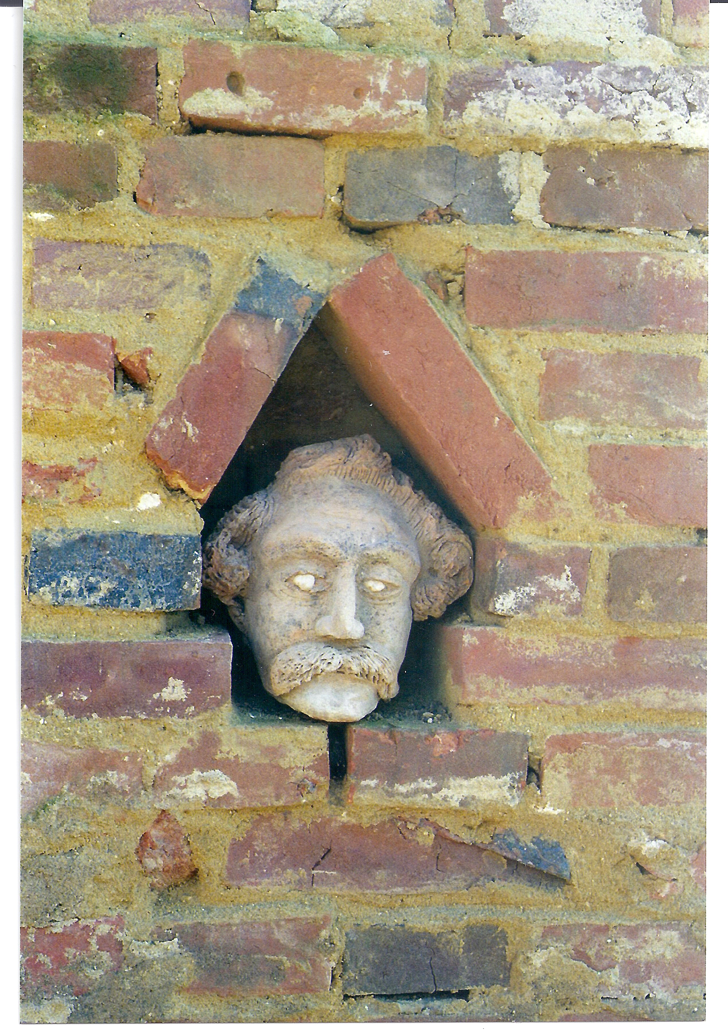 Alte Mauer in Ortprechting mit Nische für einen Kopf aus Ton (Renaissance)